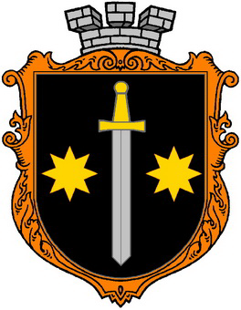 Сучасний герб селищa міського типу Микулинці